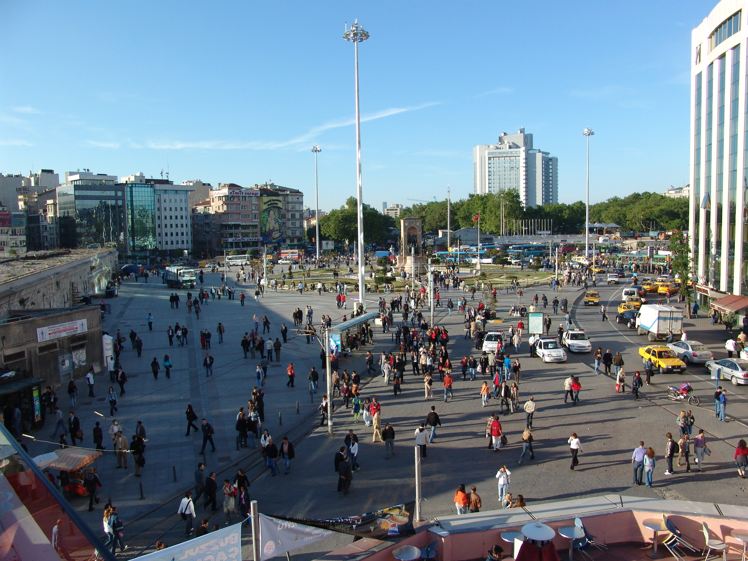 Taksim Square, Istanbul